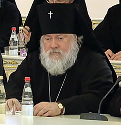 Участники Архиерейского собора Русской православной церкви на встрече с Дмитрием Медведевым.